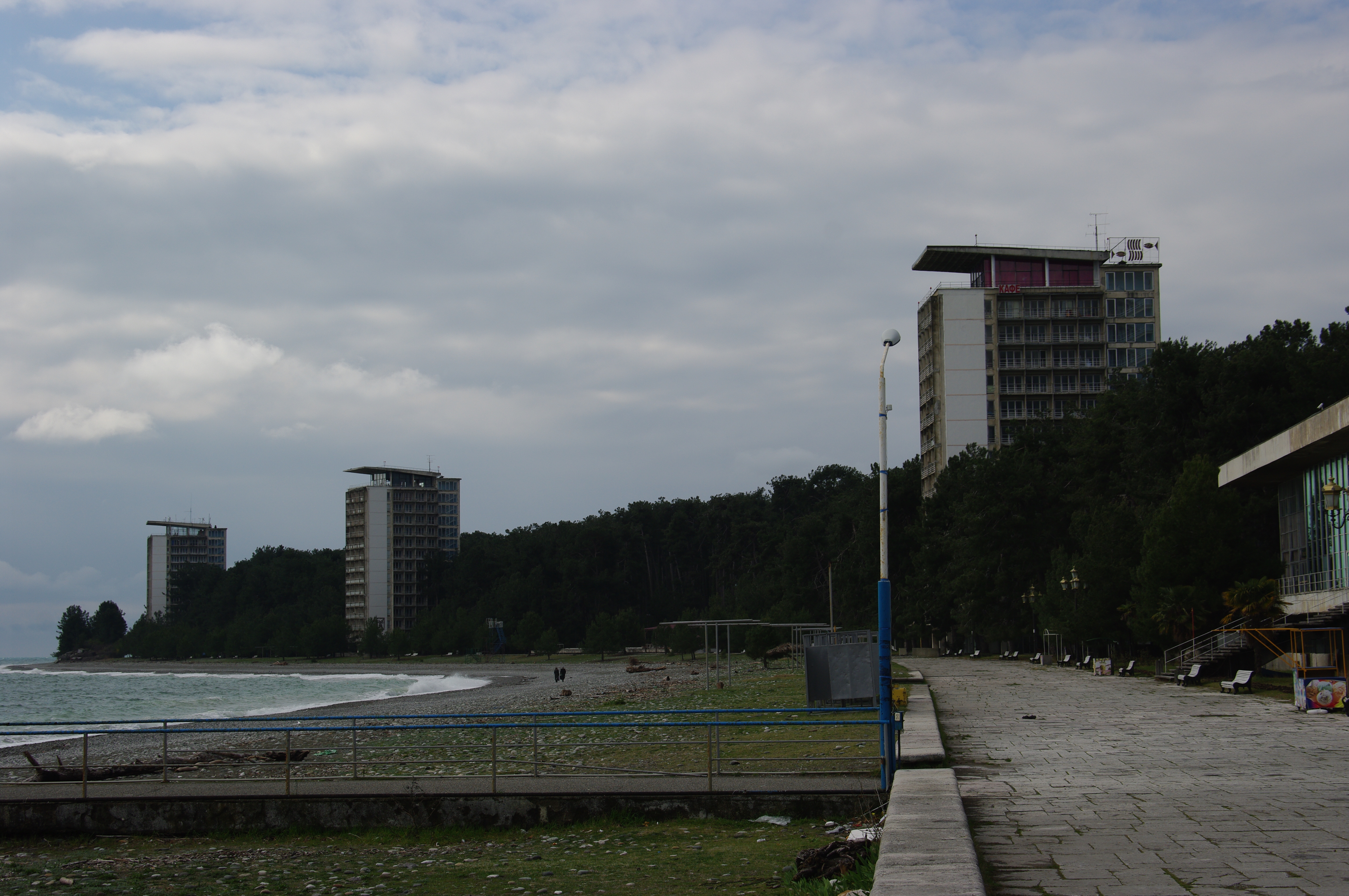 Вікіекспедиція до Абхазії